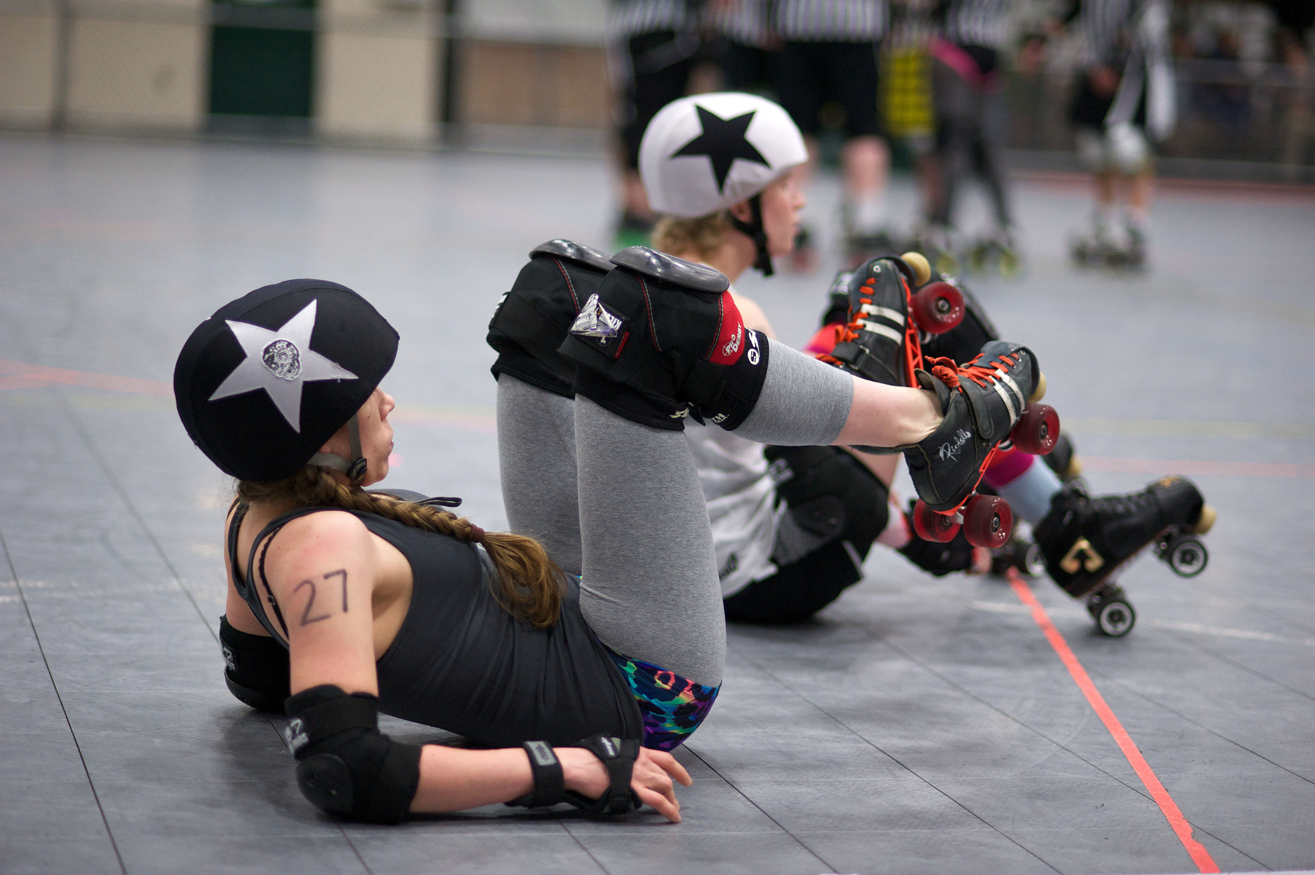 Valentines Scrimmage-20130214-0897